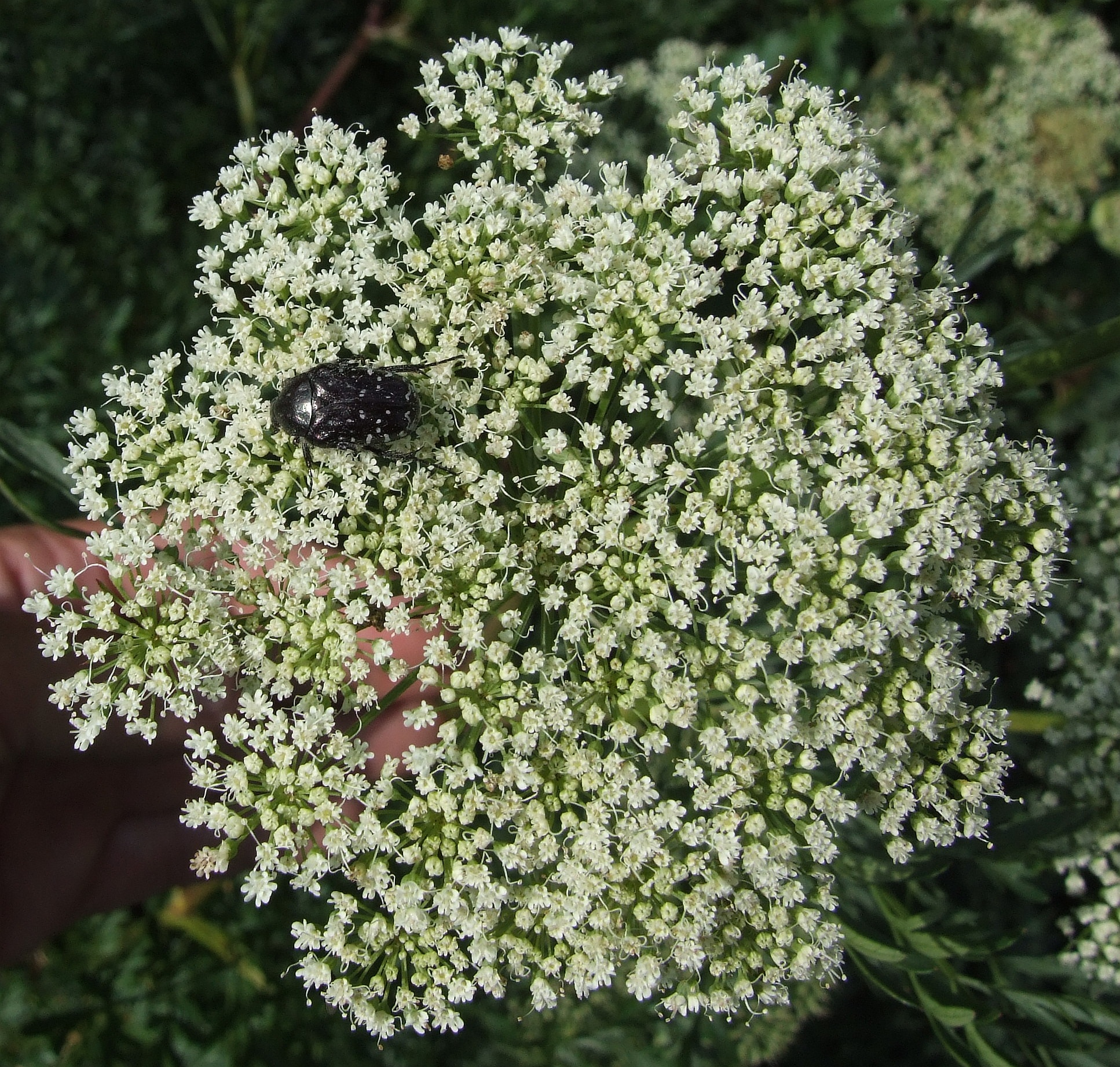 Silaum silaus (pl. koniopłoch łąkowy)